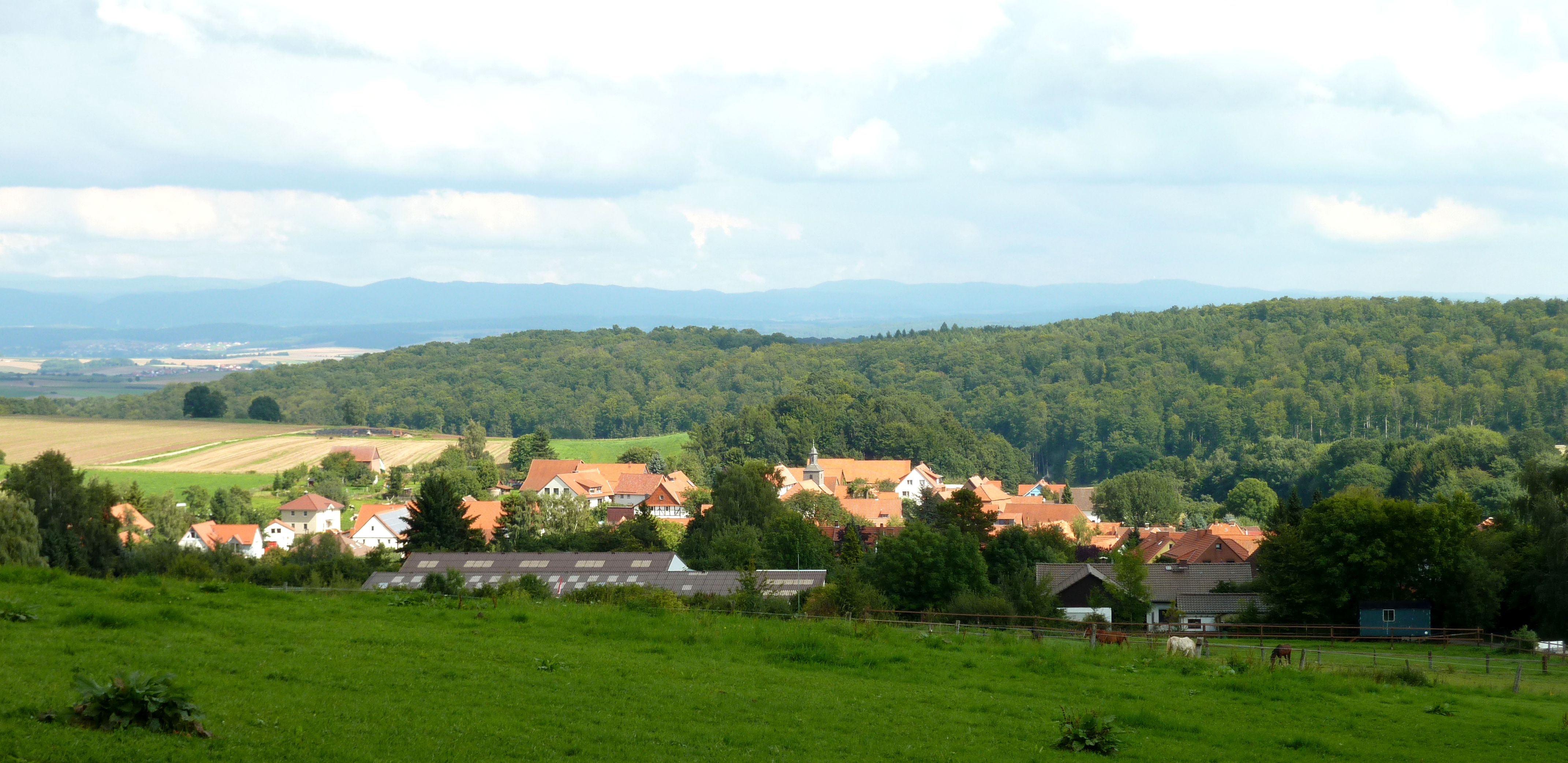 Blick vom Osthang des Göttinger Waldes auf Mackenrode, Gemeinde Landolfshausen, Landkreis Göttingen, Südniedersachsen